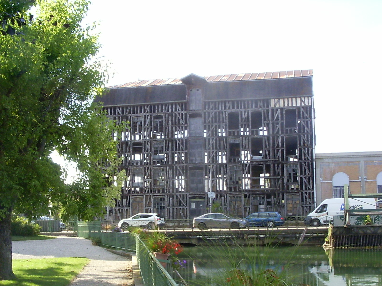 Bar-sur-Seine, watermolen